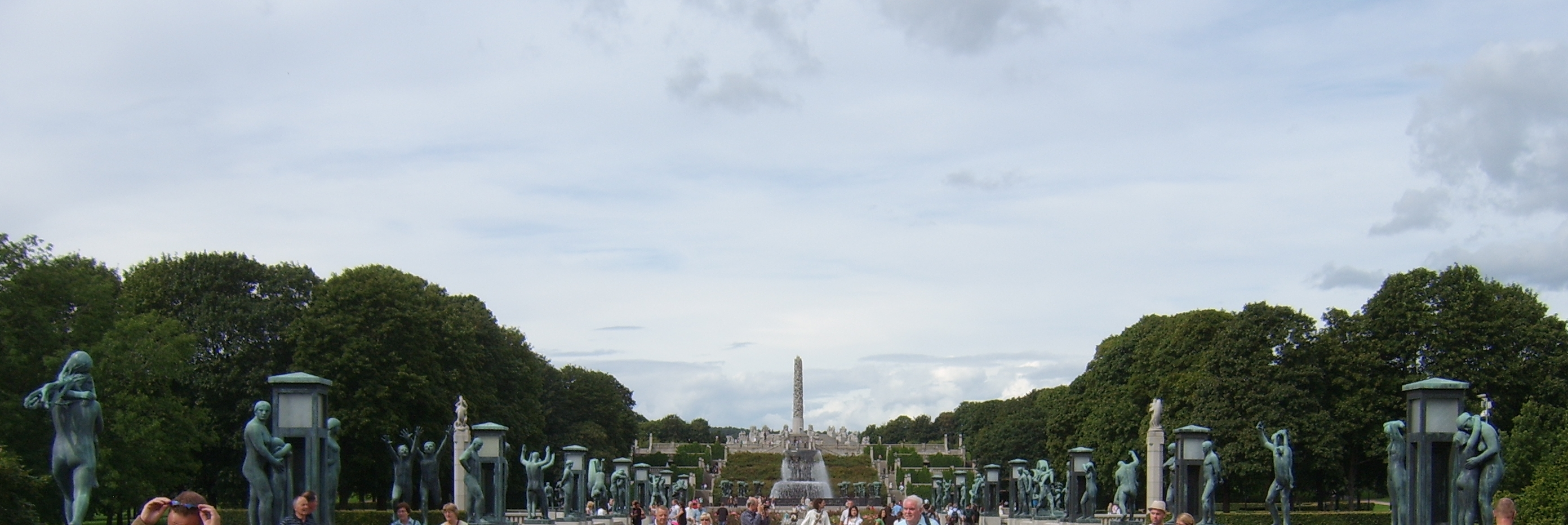 Skulpturenpark, Oslo, Norway